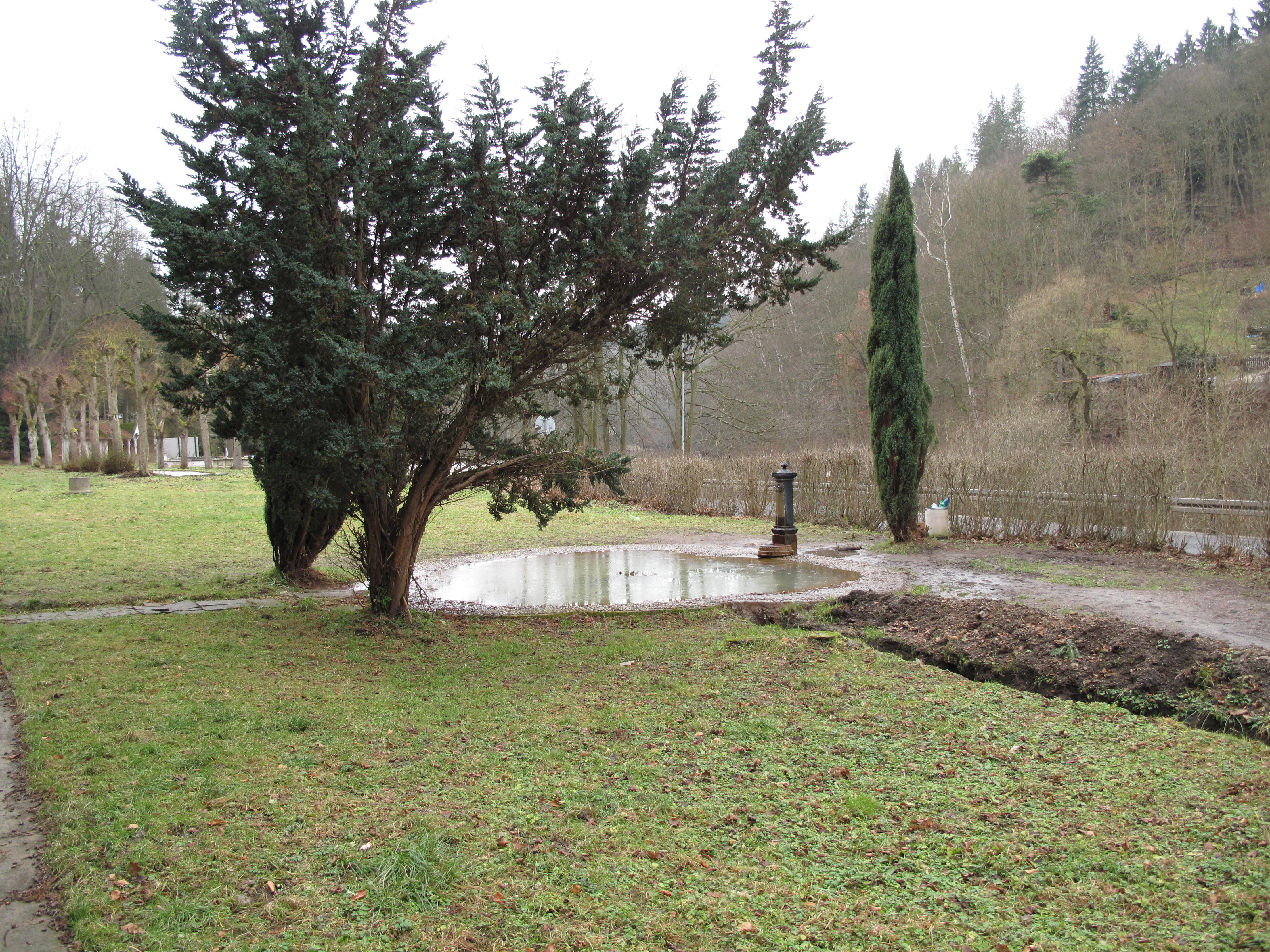 Kyselka. Okres Karlovy Vary, Česká republika.